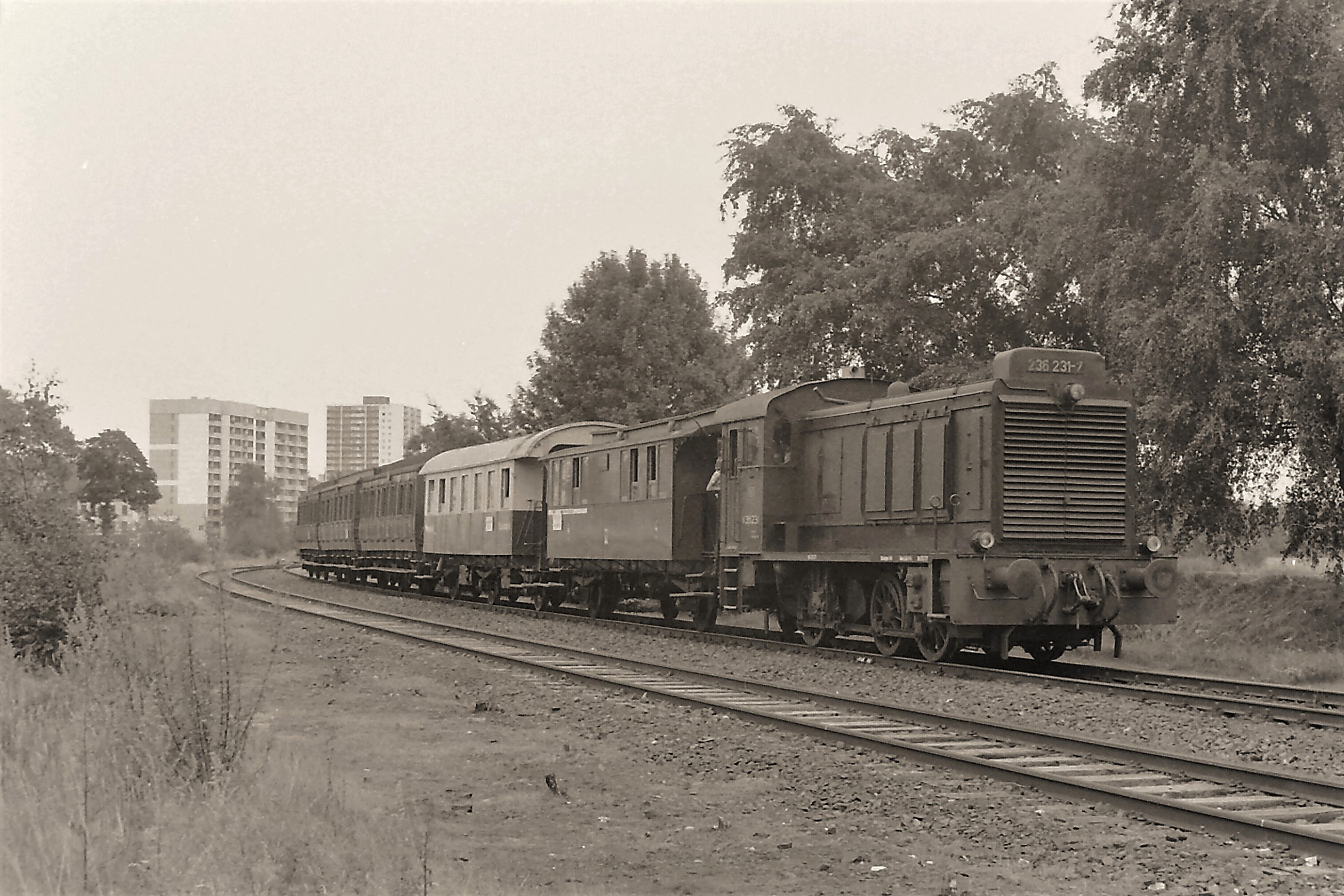 Museumszug des Eisenbahnmuseums Bochum-Dahlhausen in Steele Süd.